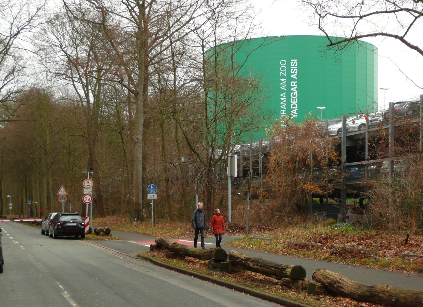 Panorama am Zoo am Zoo Hannover